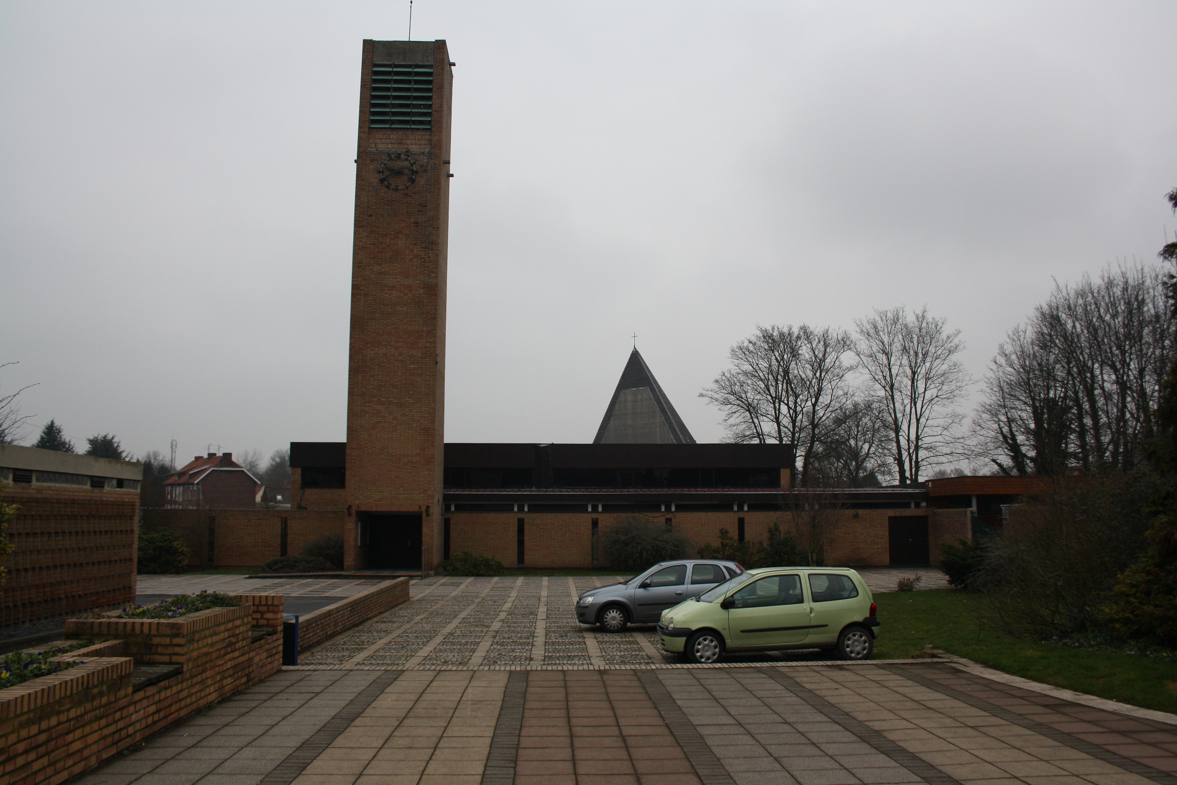 Église paroissiale Notre-Dame-de-la-Visitation à auby (France).